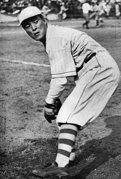 景浦將